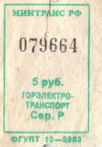 Билет на трамвай в Архангельске